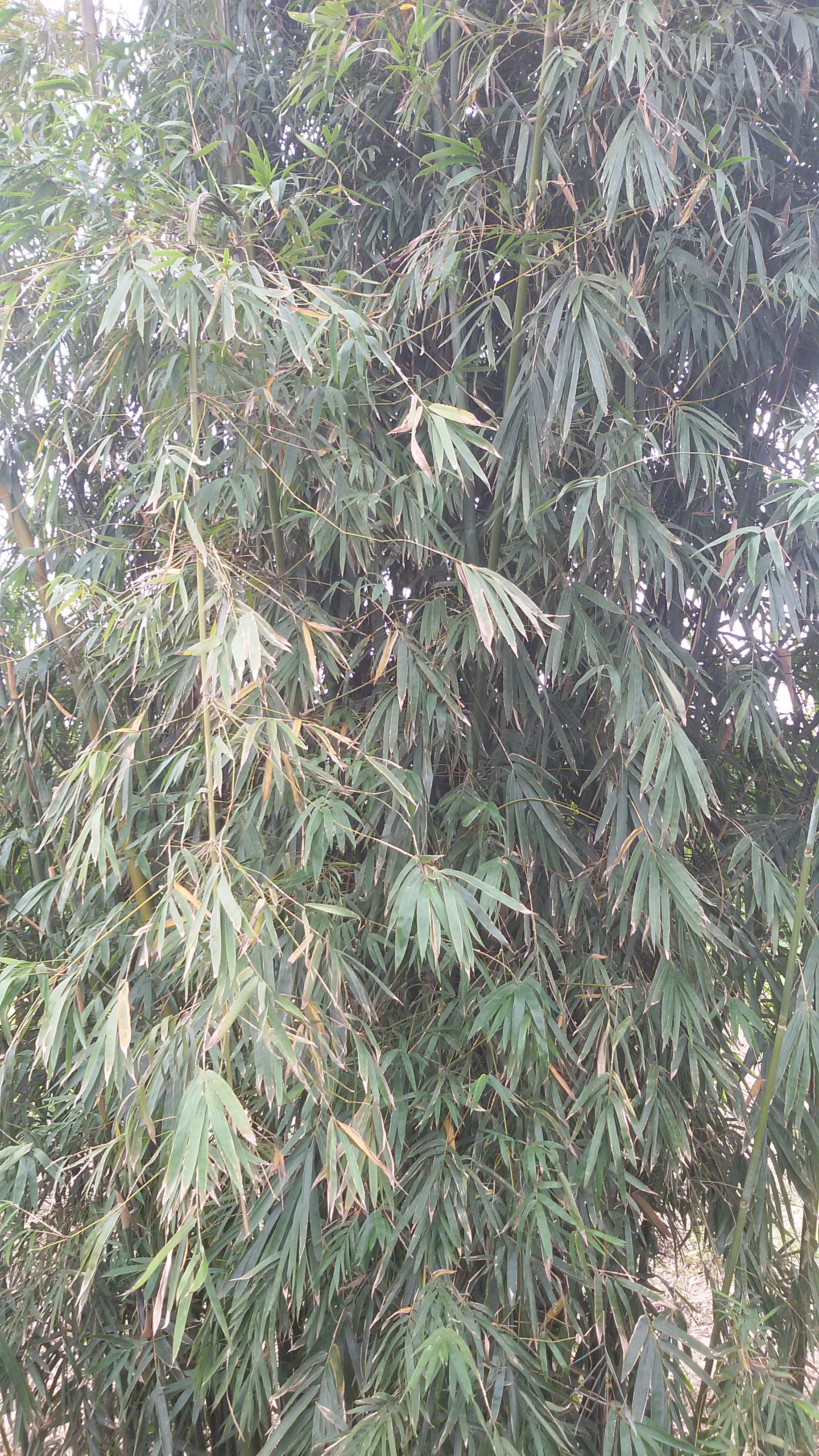 粵語: 喺鄉下入面種嘅麻竹